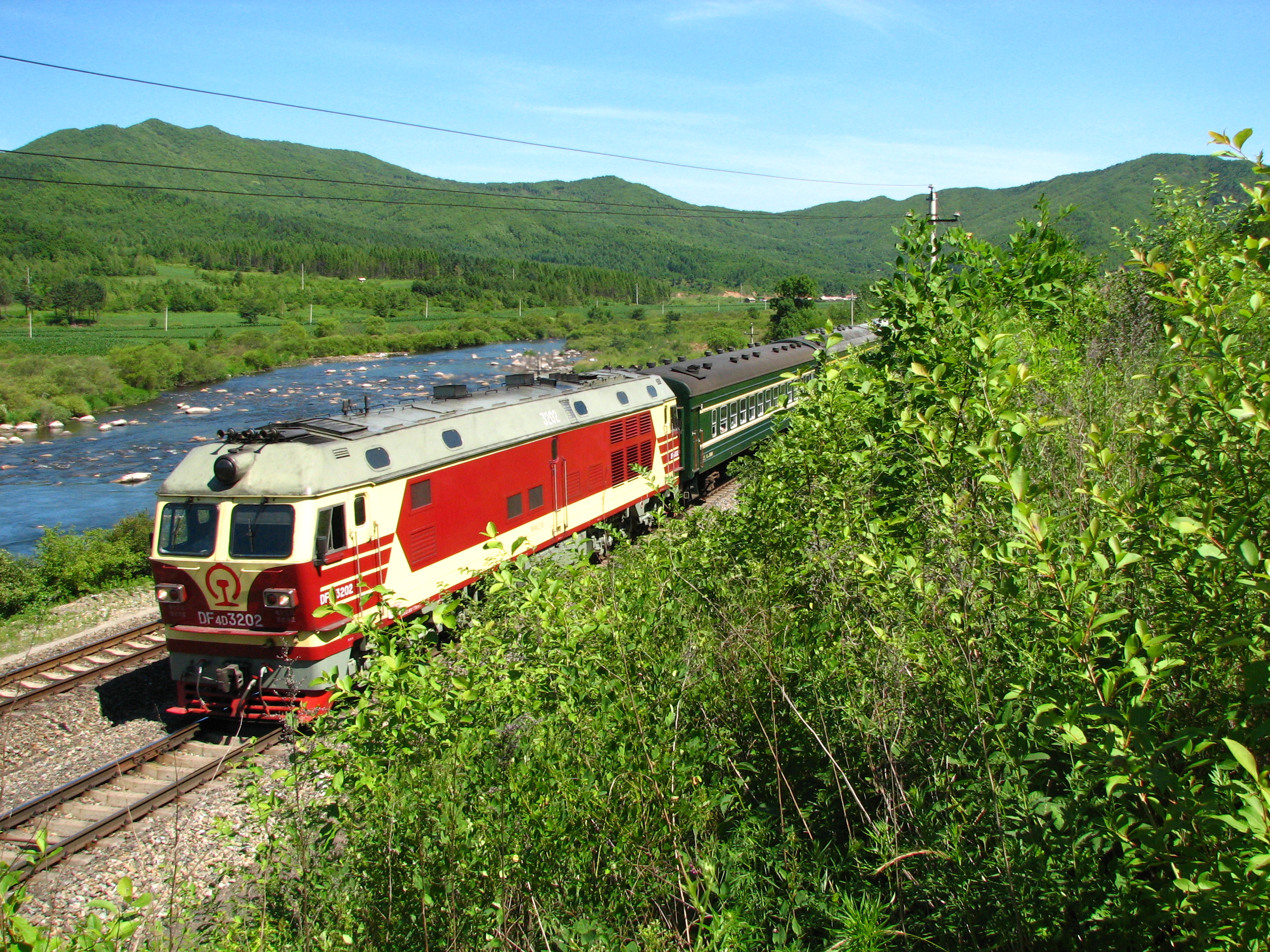 梧桐大弯道 客车k7064